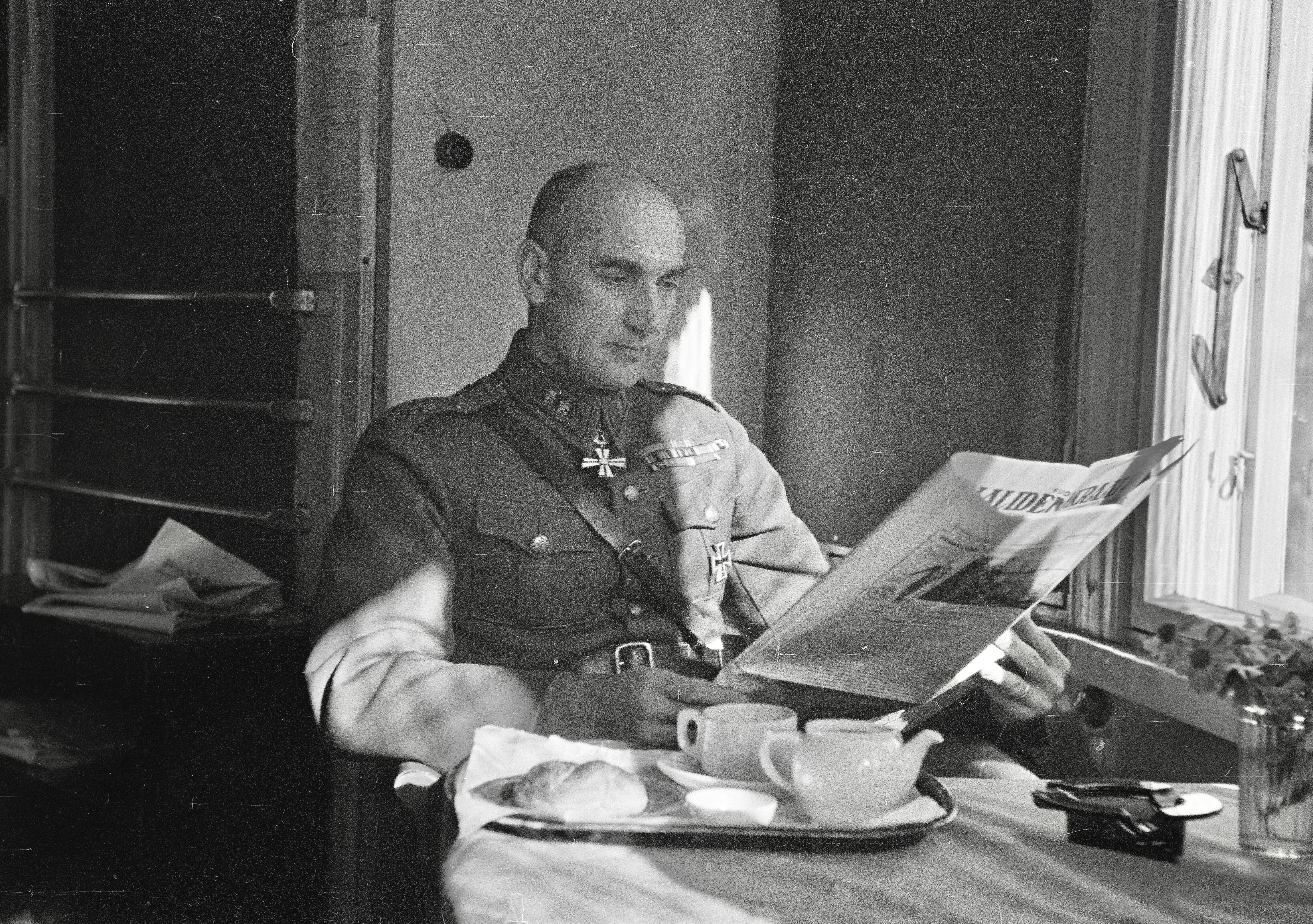 Merivoimien komentaja kenraali Valve kahvitunnilla merivoimien esikunnassa.